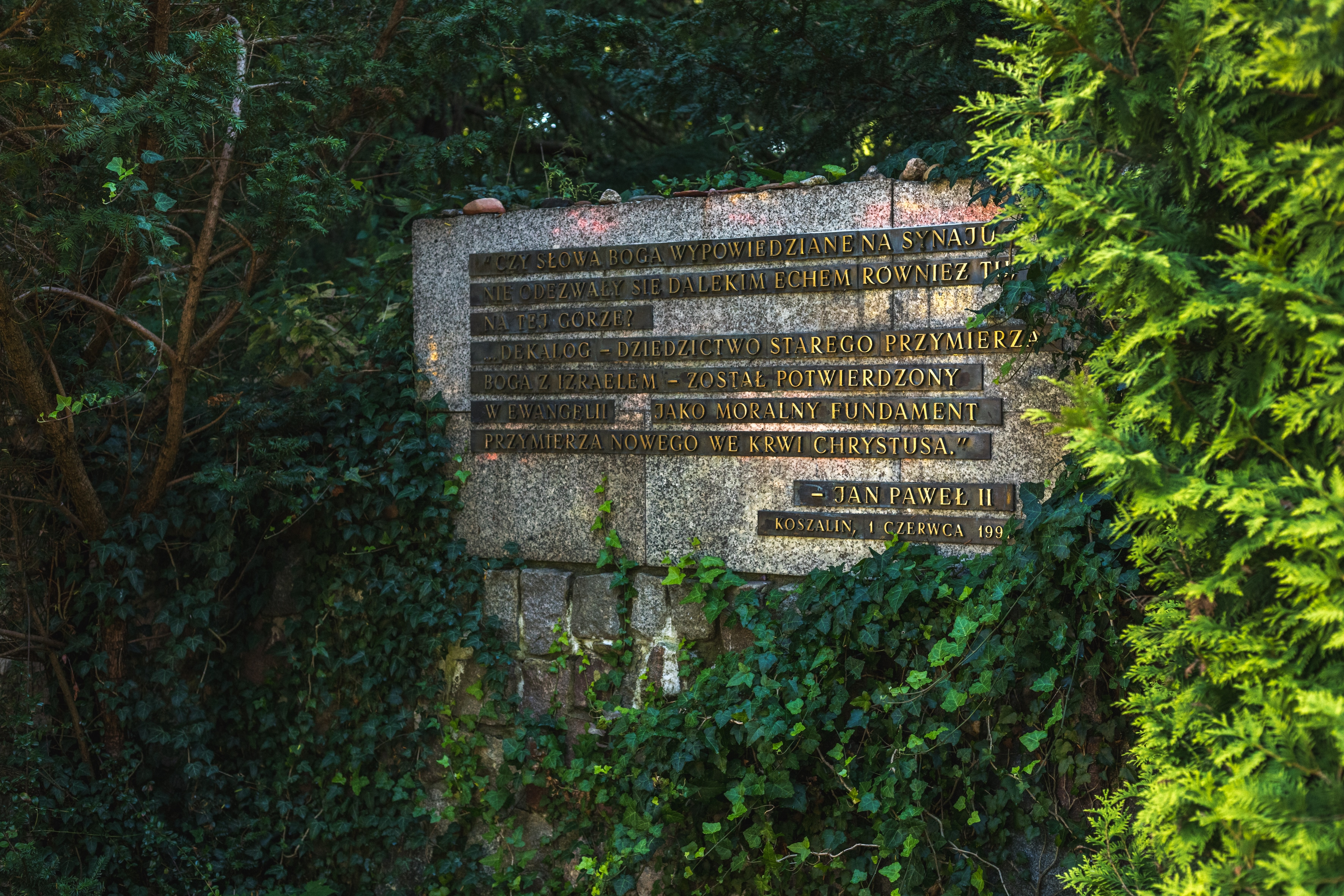 Tablica upamiętniająca słowa Papieża Jana Pawła II wypowiedziane na Górze Chełmskiej podczas pielgrzymki 1 czerwca 1991r.